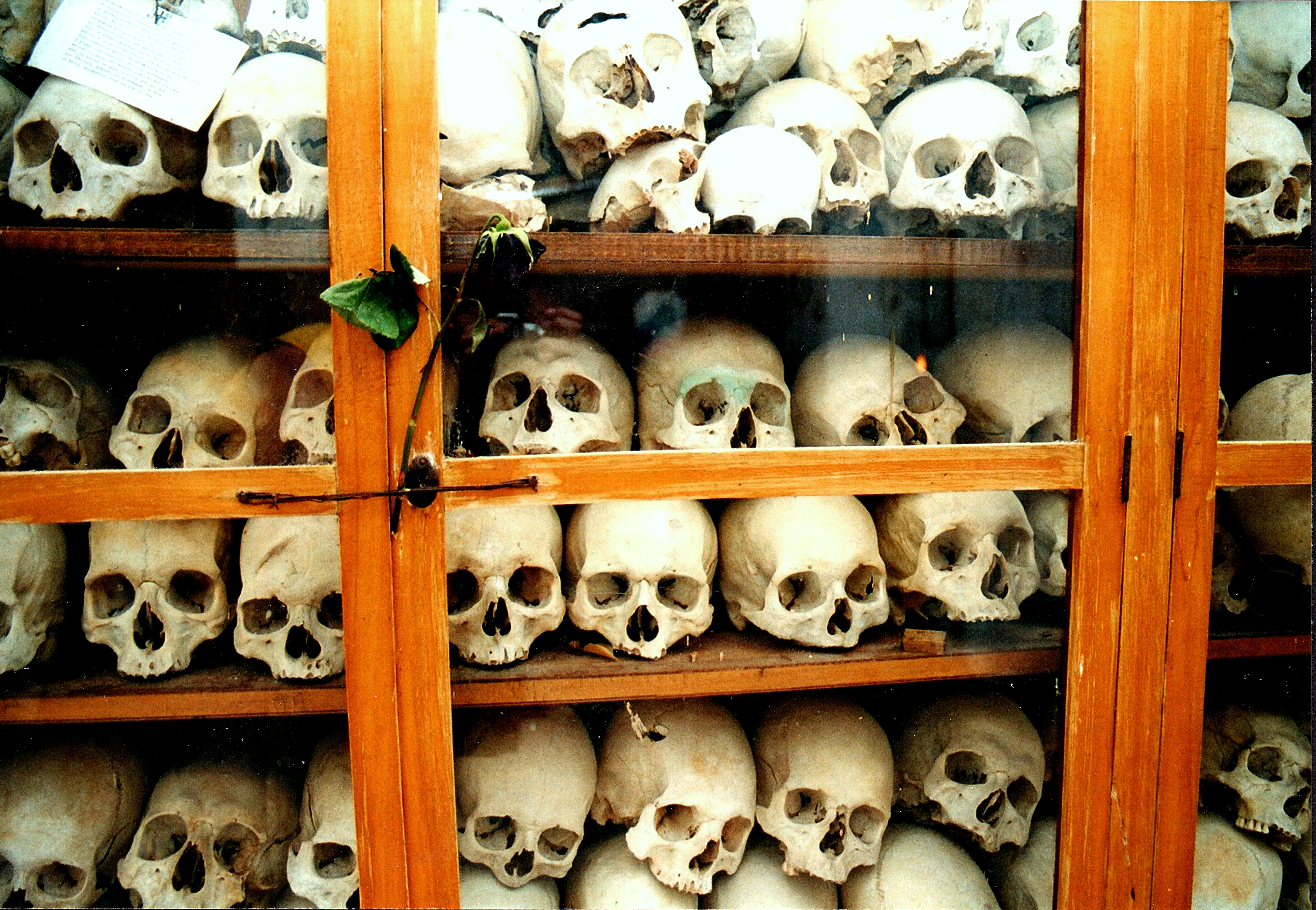 Nea Moni, Chios, slachtoffers Turkske ynfal 1822